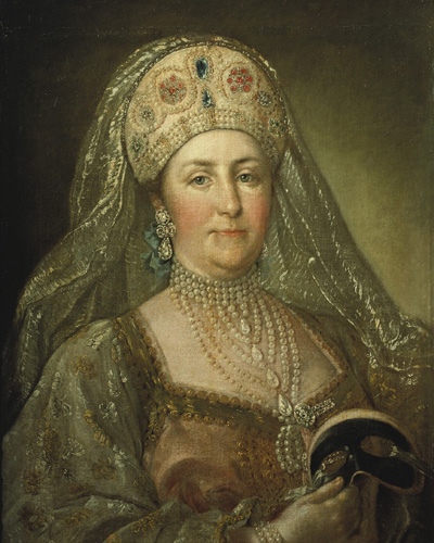 Katharina II., genannt Katharina die Große